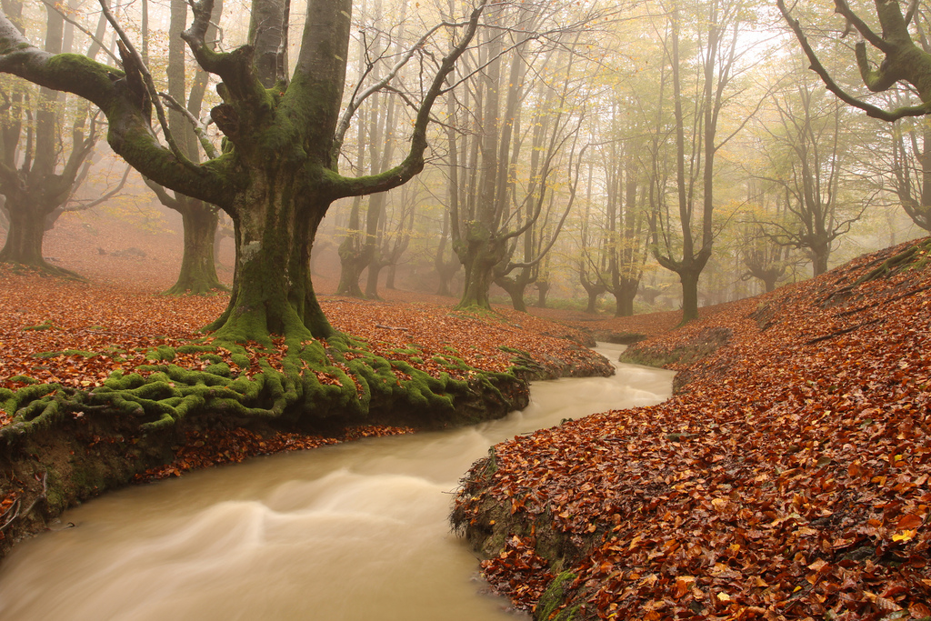 Este es, probablemente, el árbol más fotografiado de Bizkaia. En un día soleado casi hay que hacer cola para retratarlo así que aproveche que hacía frío, niebla y caía un diluvio para quedarnos él y yo a solas.